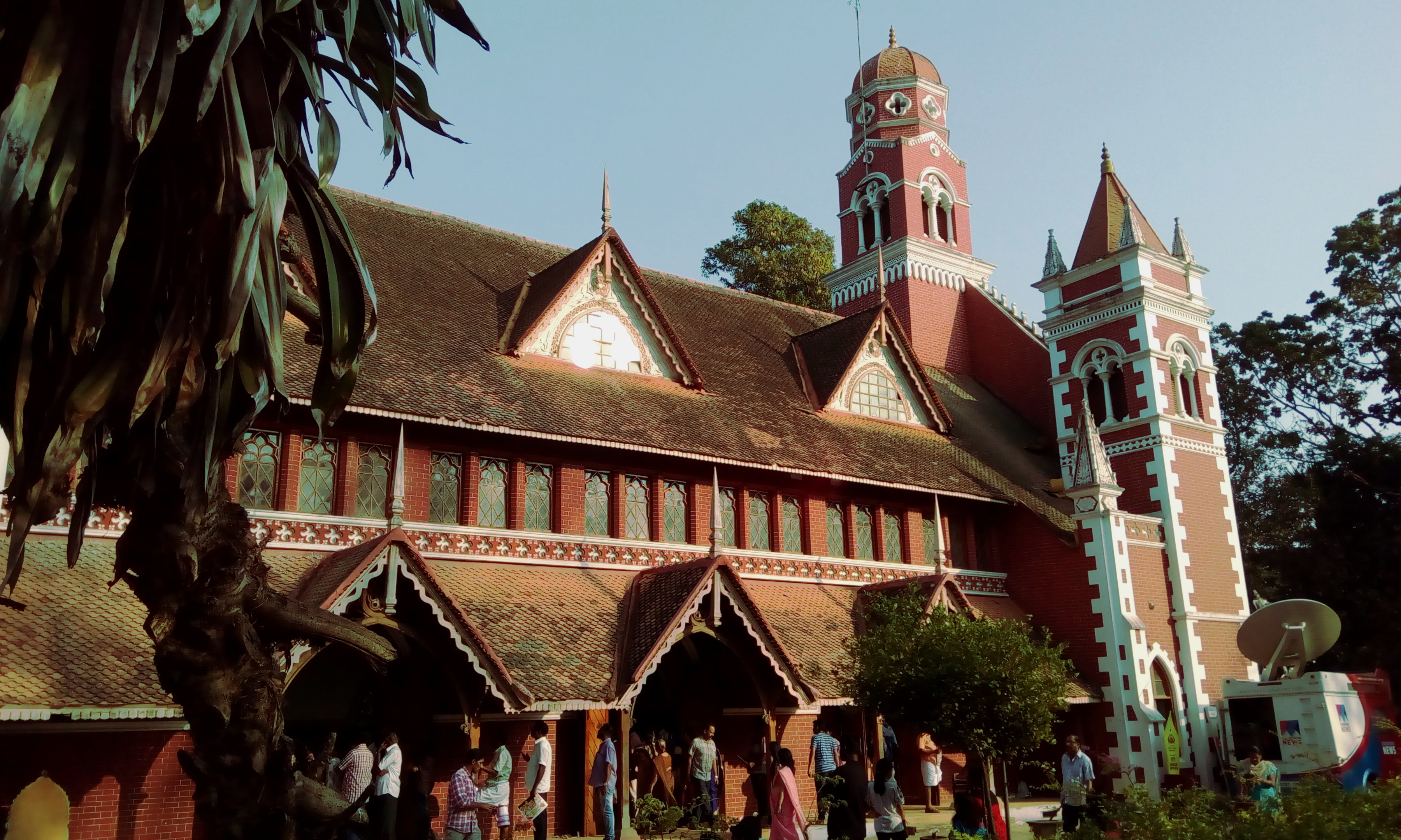 വി.ജെ.ടി. ഹാൾ